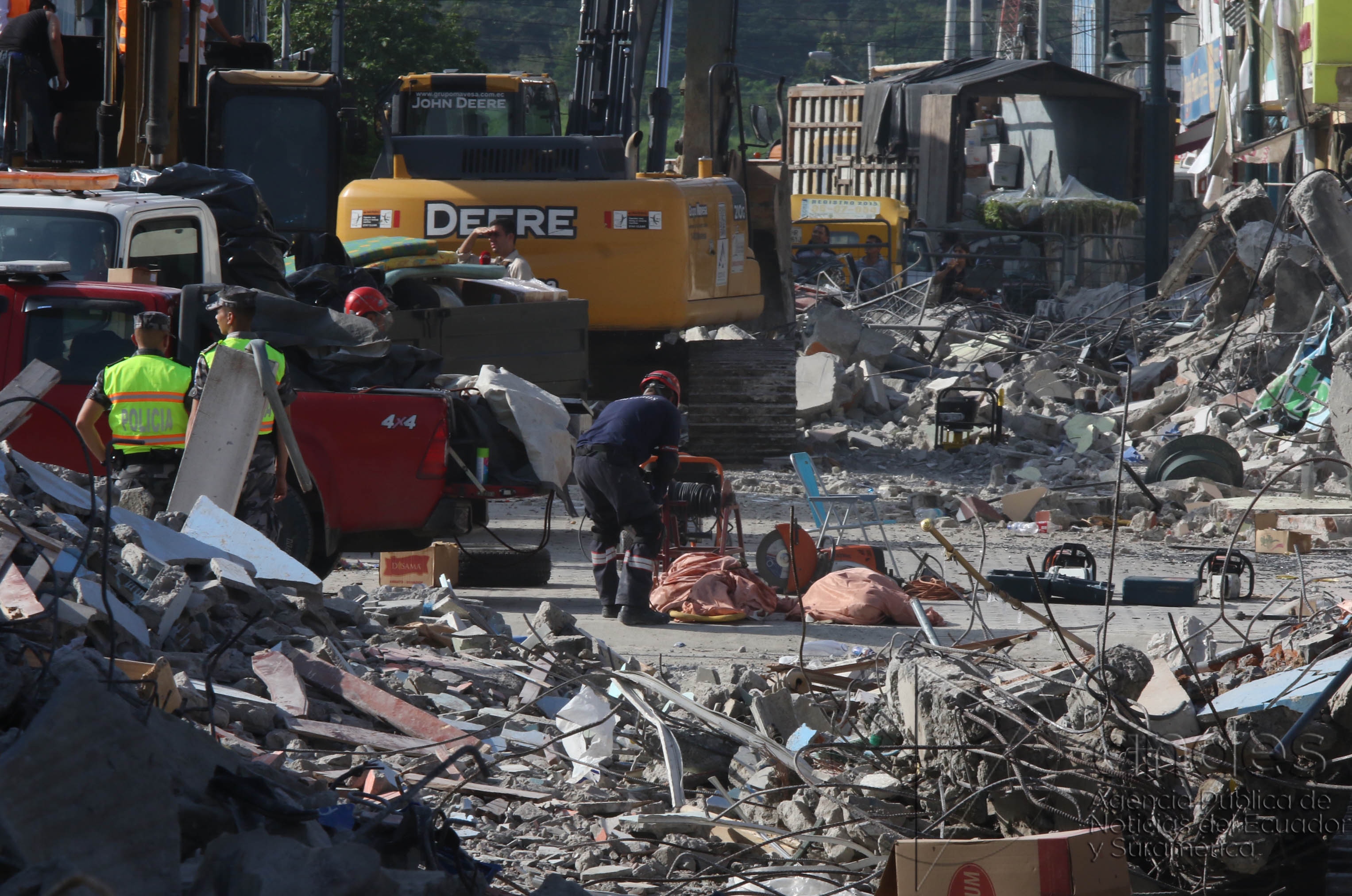 Pedernales, (Manabí) 18 abr (Andes).- Un devastador terremoto asotó al cantón Pedernales, causa de ello la población está sin suministro eléctrico y agua potable. La Policía, Cruz Roja, Bomberos, Ejército, Médicos, Paramédicos y varios grupos de voluntarios trabajan en labores de rescate y asistencia a los damnificados. ANDES/Micaela Ayala V.